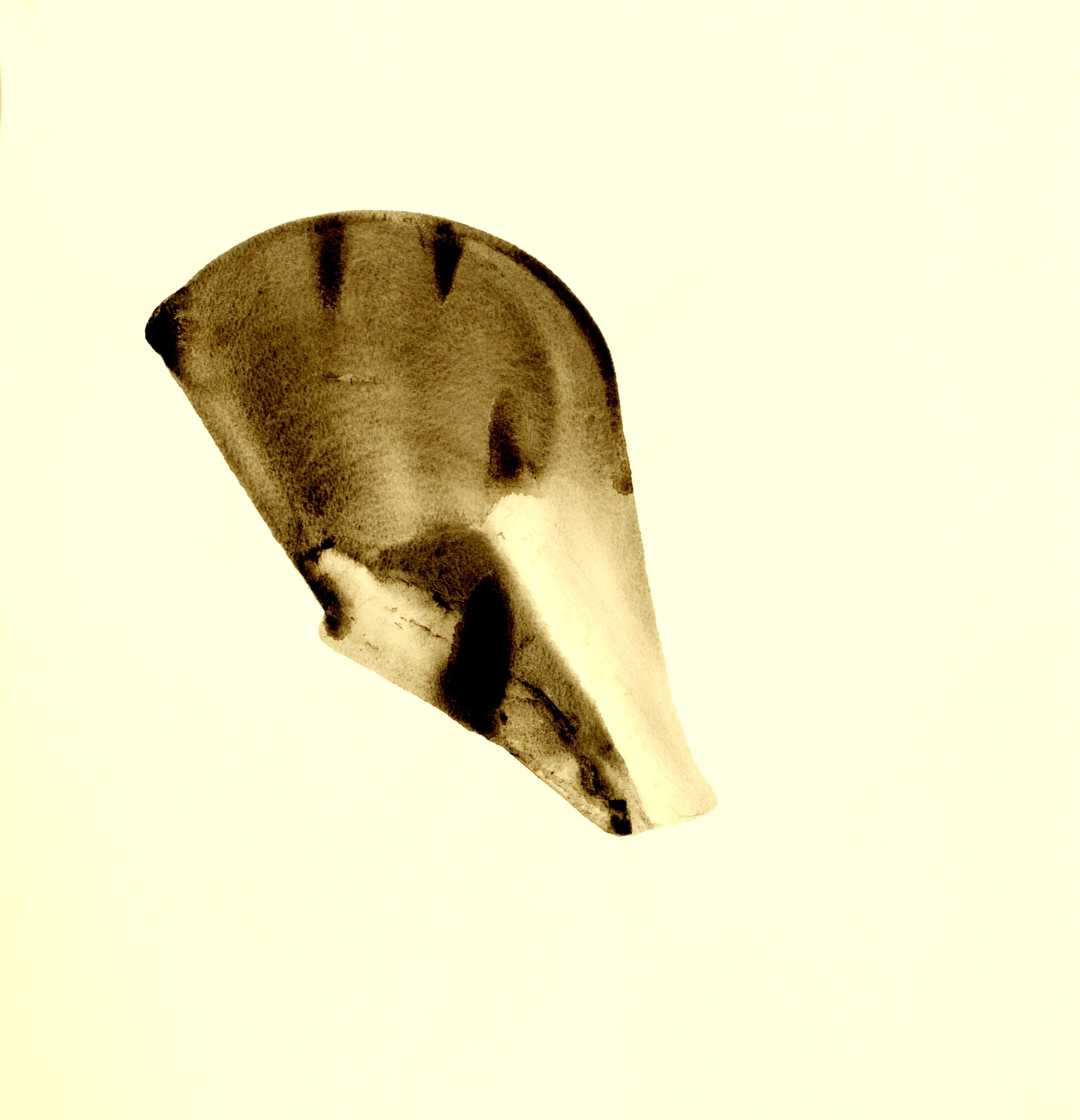 רישום מכחול, 2004, אקריליק על נייר 50X65